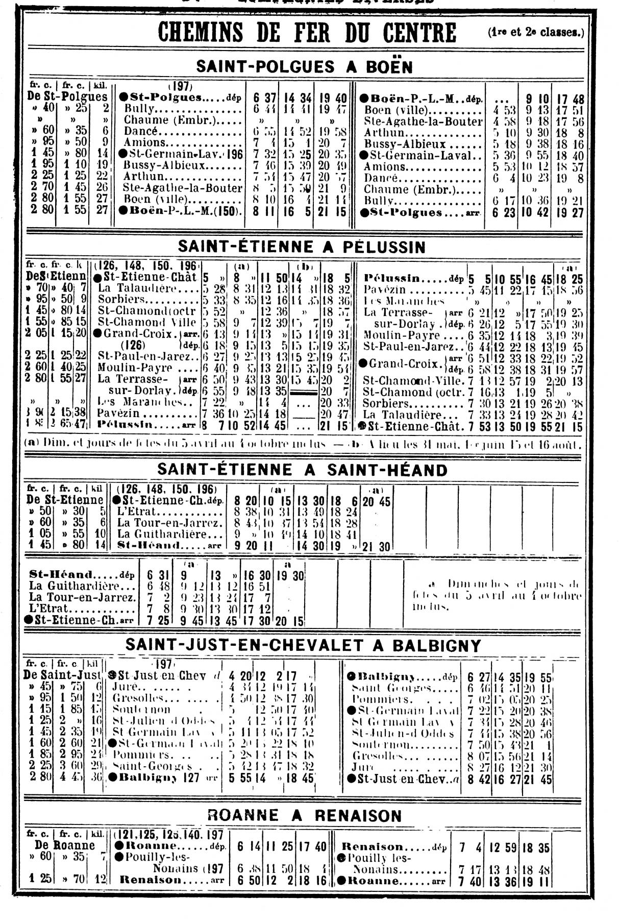 Livret horaire des Chemins de fer du Centre